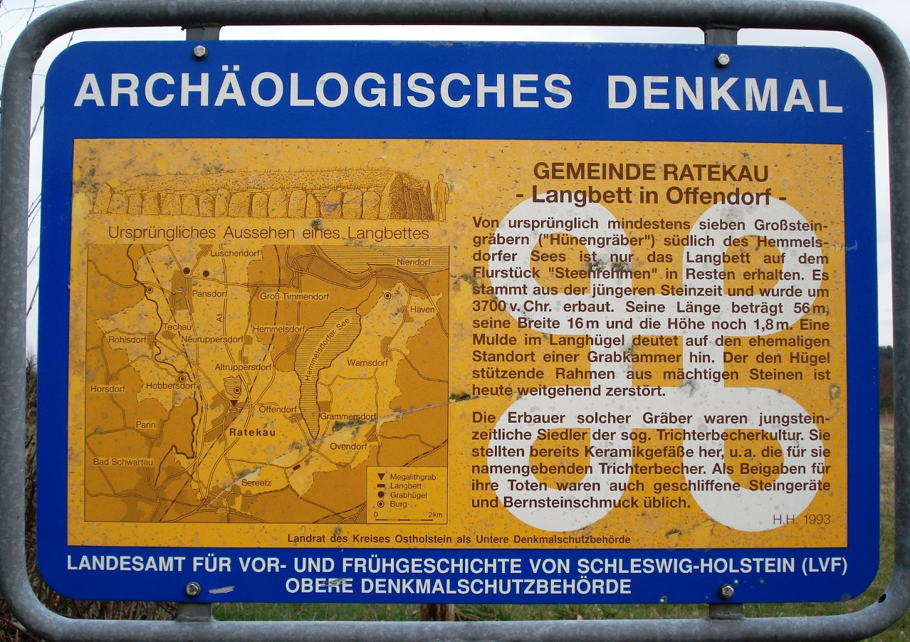 Informationstafel am Langbett Langenrehm